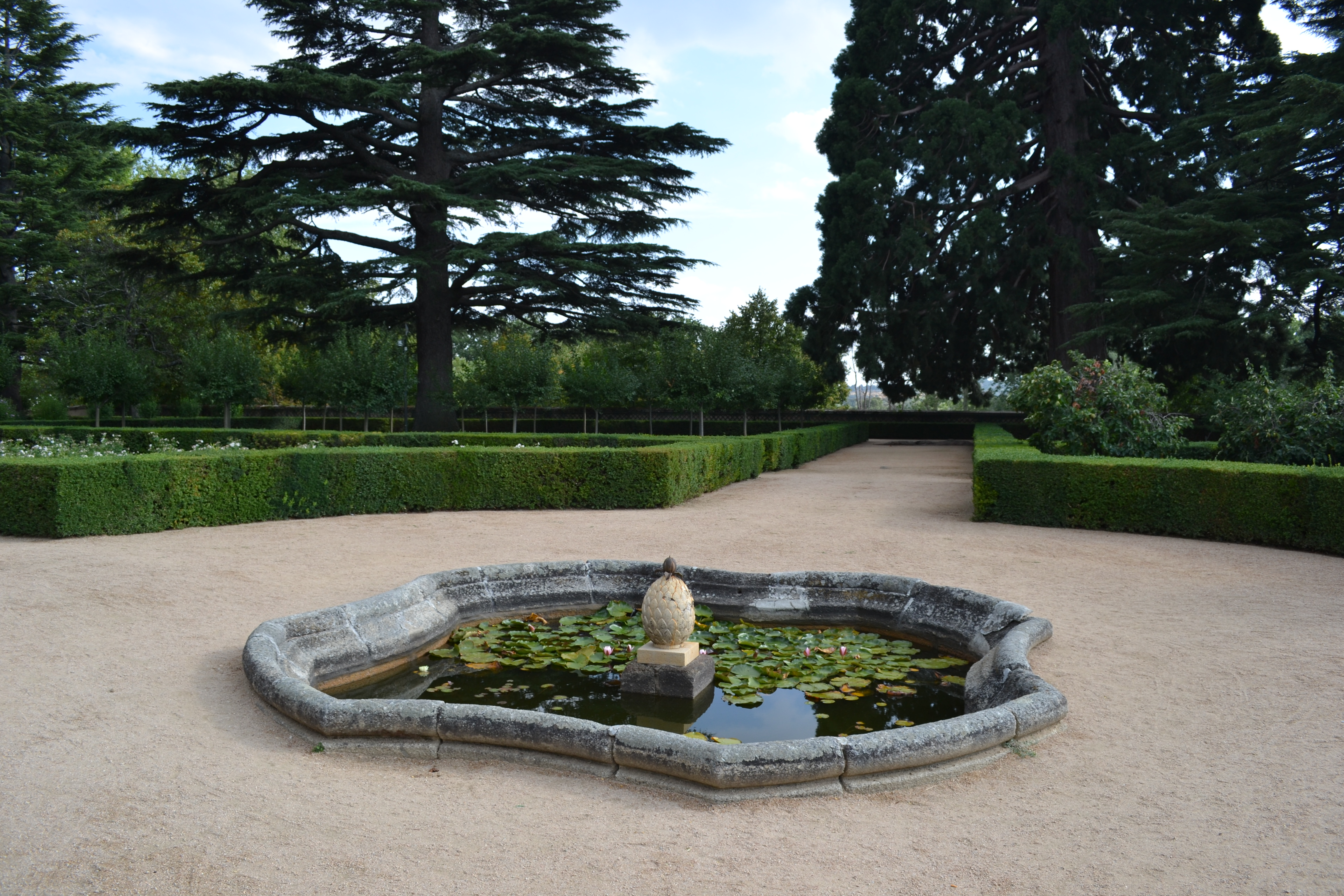 Jardín de la Casita del Príncipe (El Escorial).